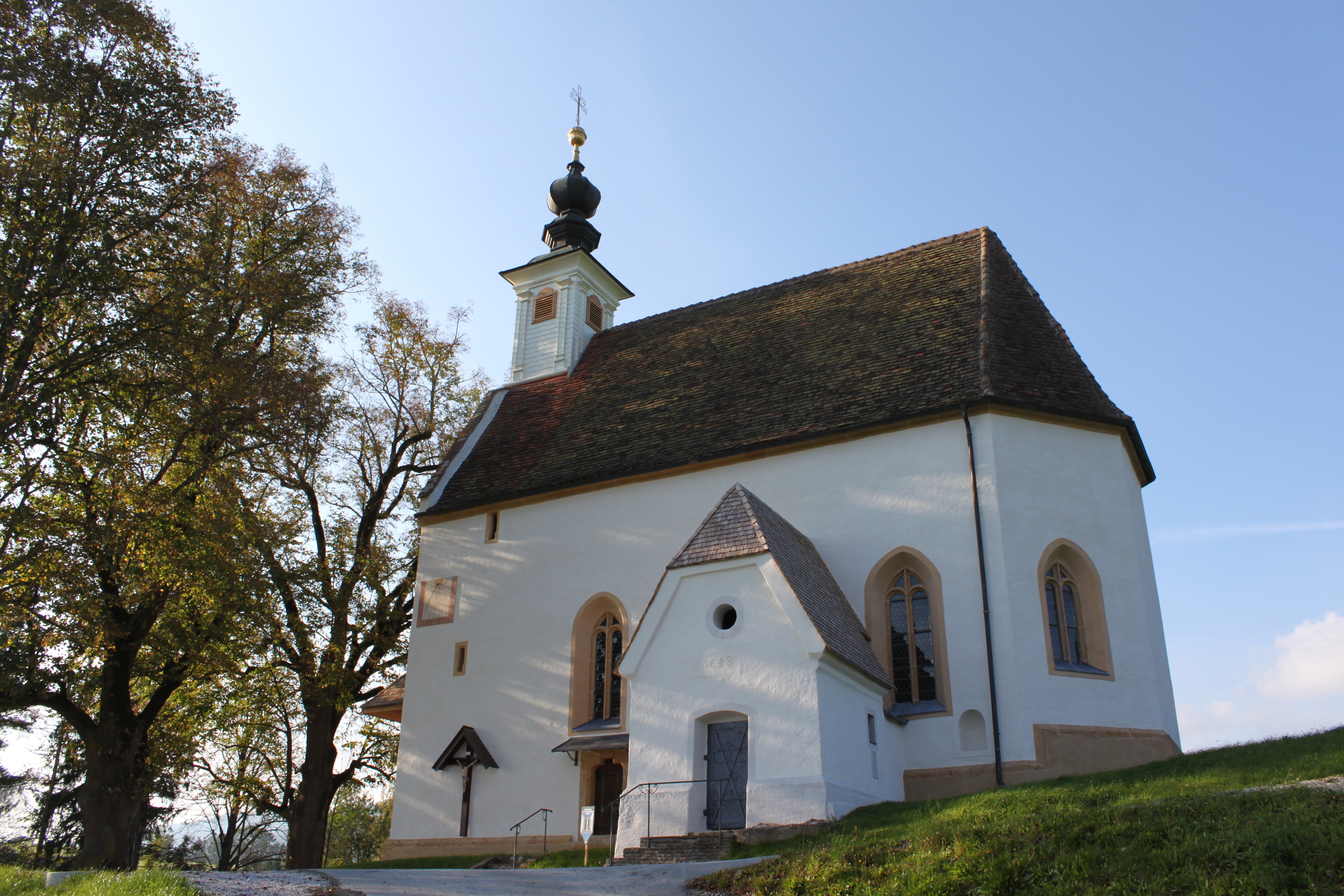 Annakirche (Passail); 2 Linden als GLT geschützt